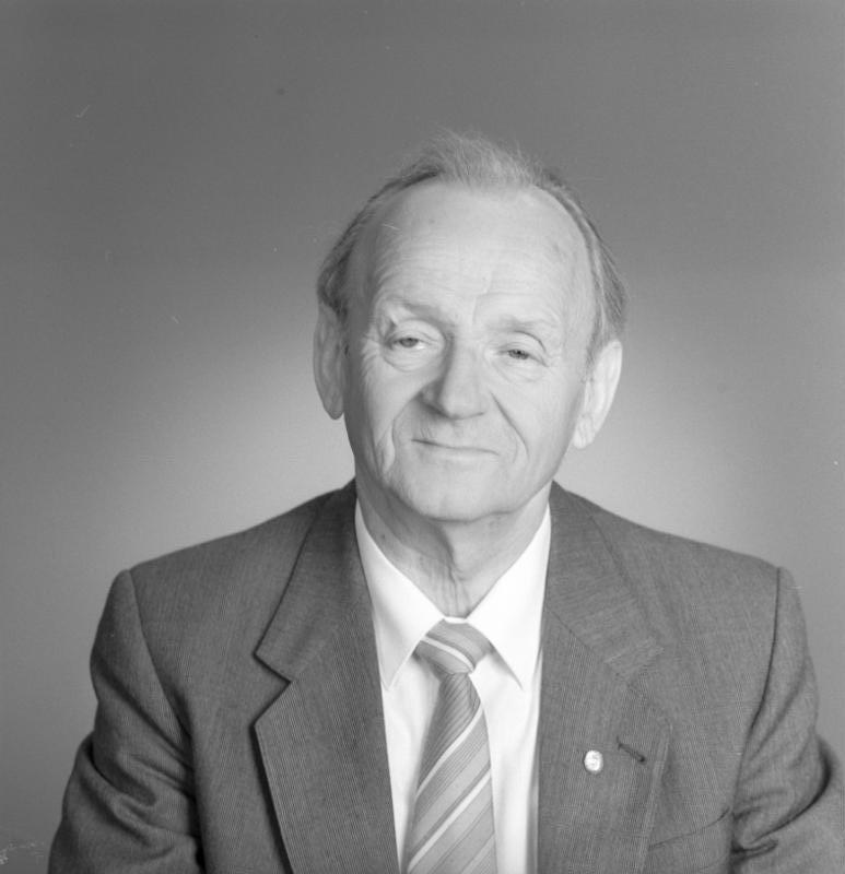 ADN-ZB Brüggemann 13.6.86 Berlin: Prof. Dr. so. med. Dr. h.c. Ludwig Mecklinger, Minister für Gesundheitswesen, Obermedizinalrat; Mitglied des ZK der SED; geb. am 14.11.1919; Facharzt für Sozialhygiene, Diplomjurist.